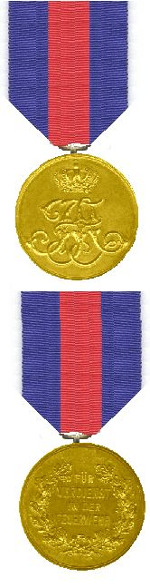 Medaille